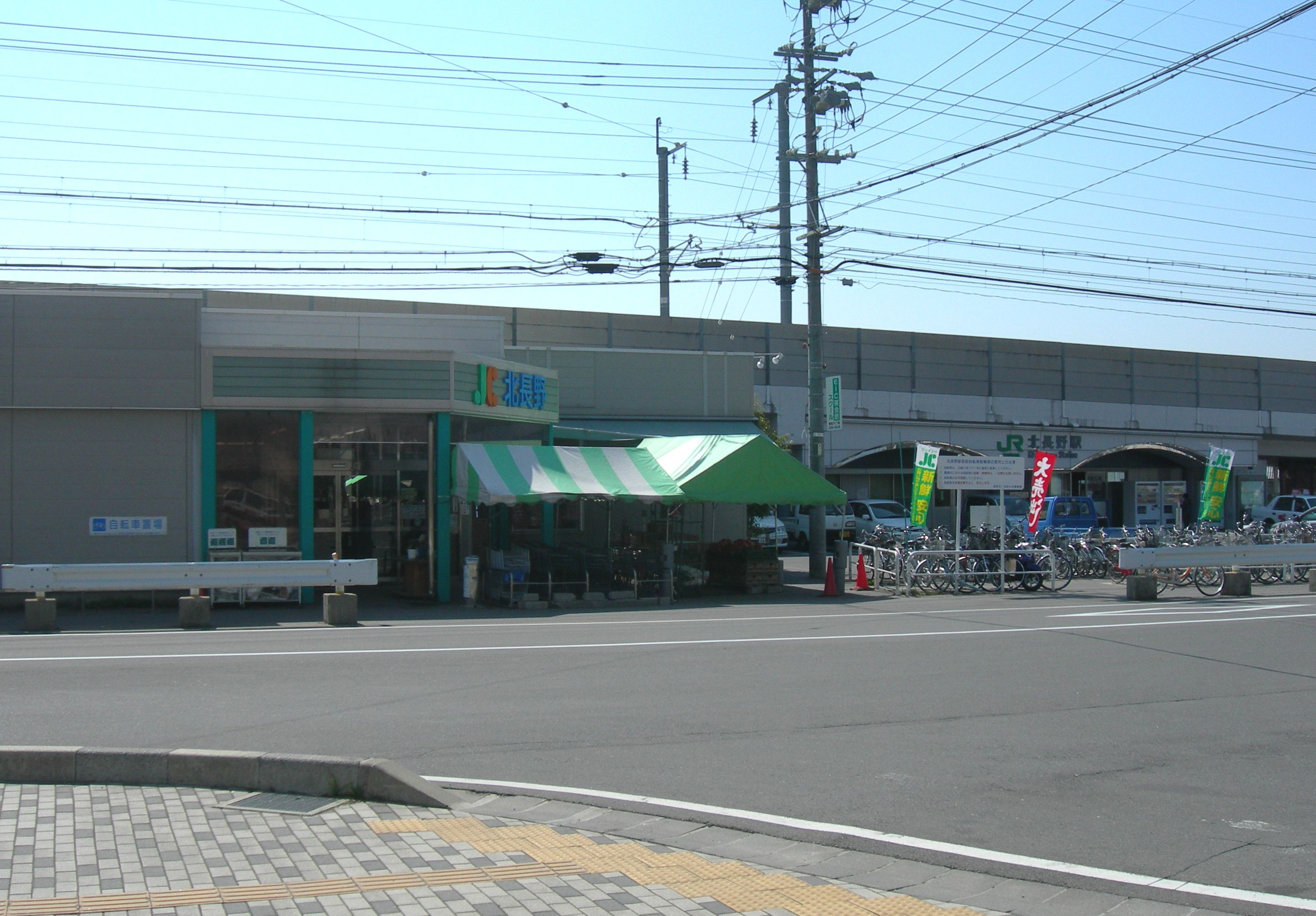 北長野駅と 新鮮市場JC